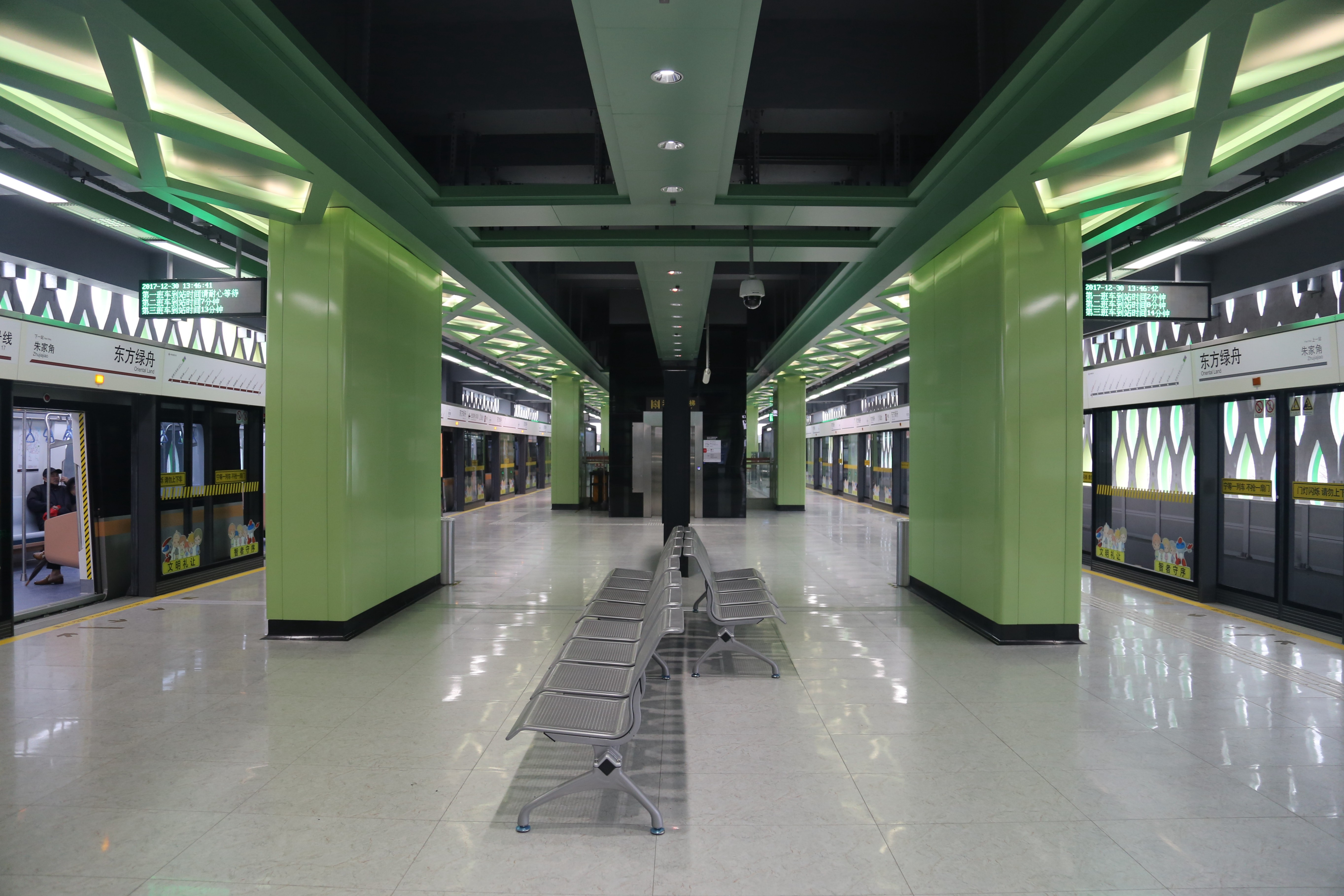 东方绿舟站站台